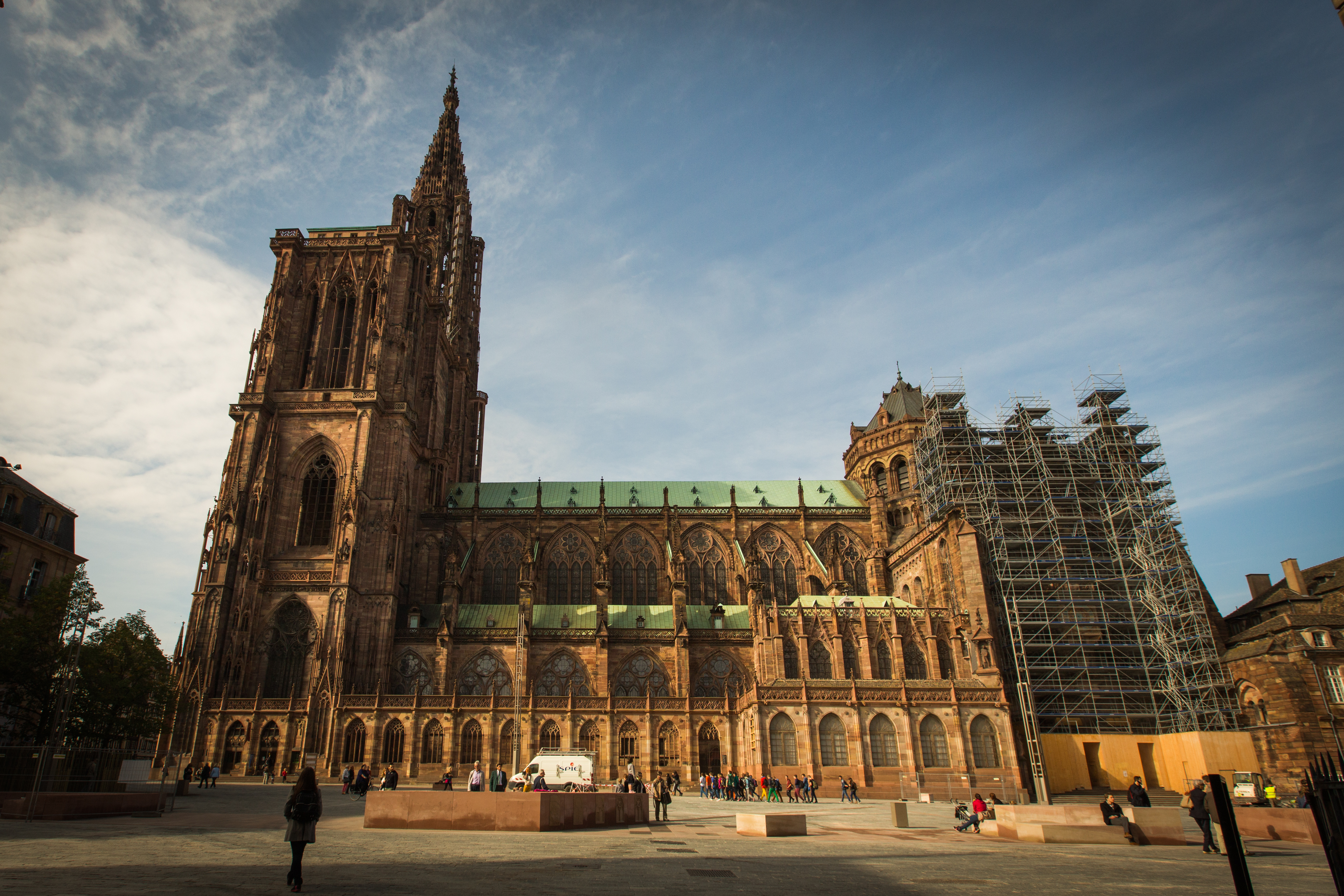 Strasbourg Cathédrale Notre-Dame façade sud octobre 2013